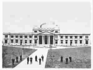 中文（中国大陆）: 上海中央造币厂旧址，现上海造币厂